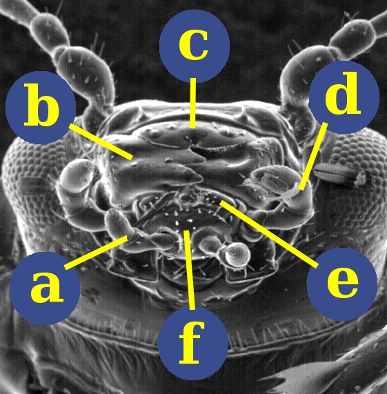 see legend below